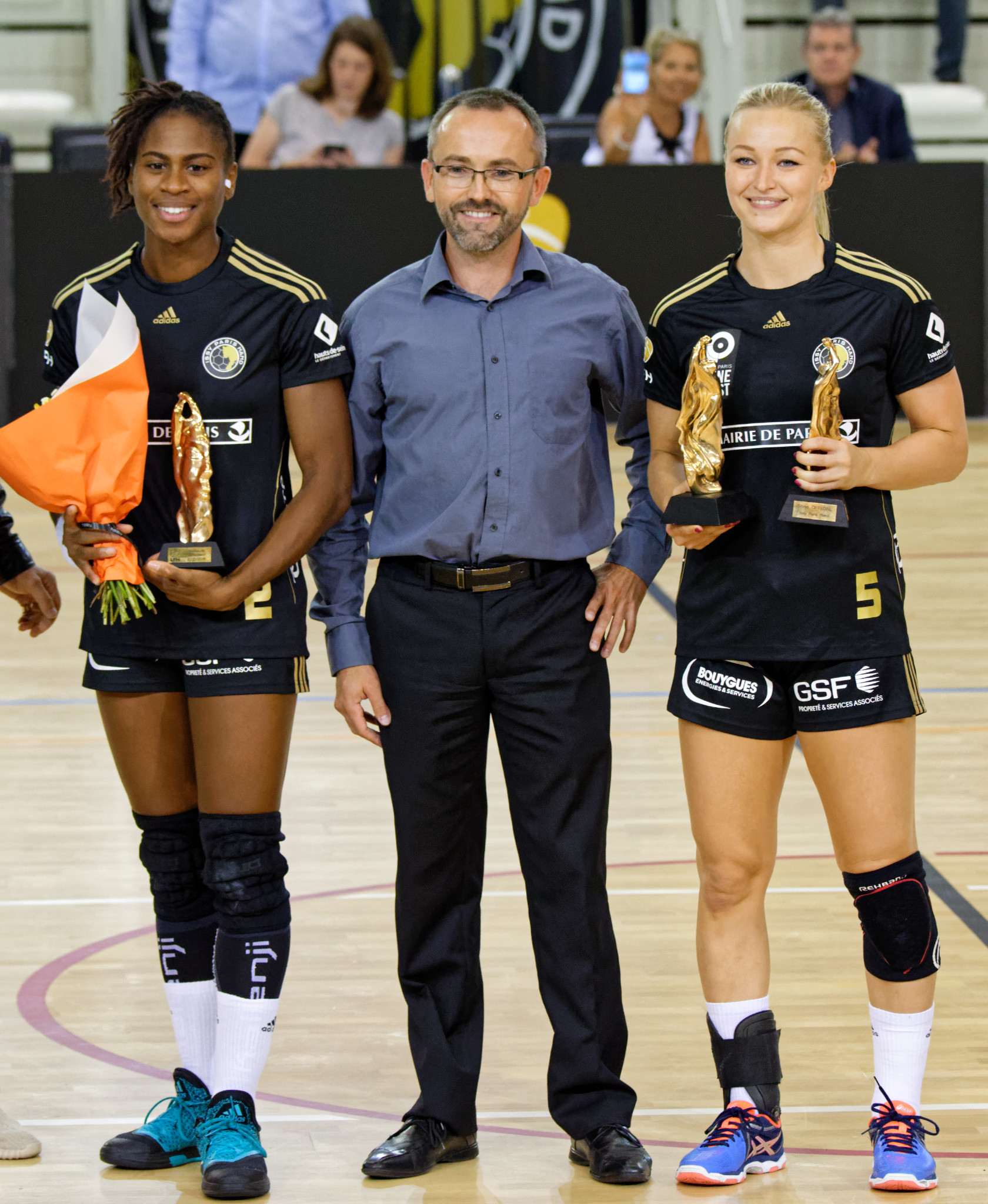 Coralie Lassource, meilleure défenseuse 2015-16 et Stine Oftedal, meilleure joueuse et meilleure demie-centre 2015-16. A Issy les moulineaux, le 14 septembre 2016